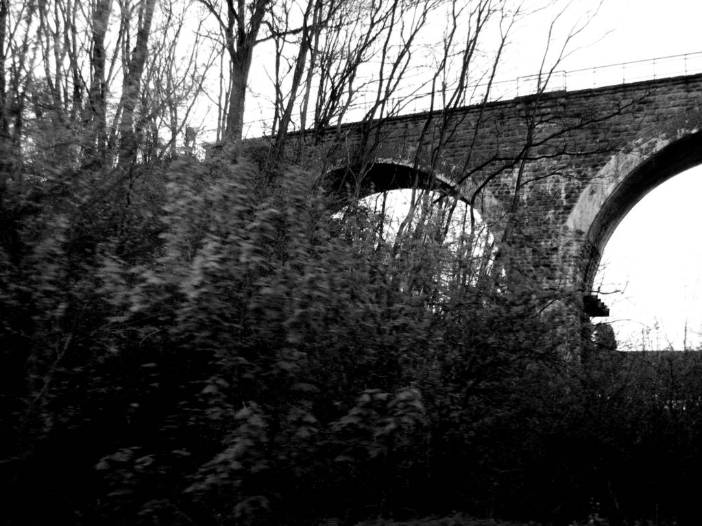 Eisenbahnviadukt der ehemaligen Sülztalbahn, Linde-Bruch bei Lindlar, Ansicht von Westen, April 2005